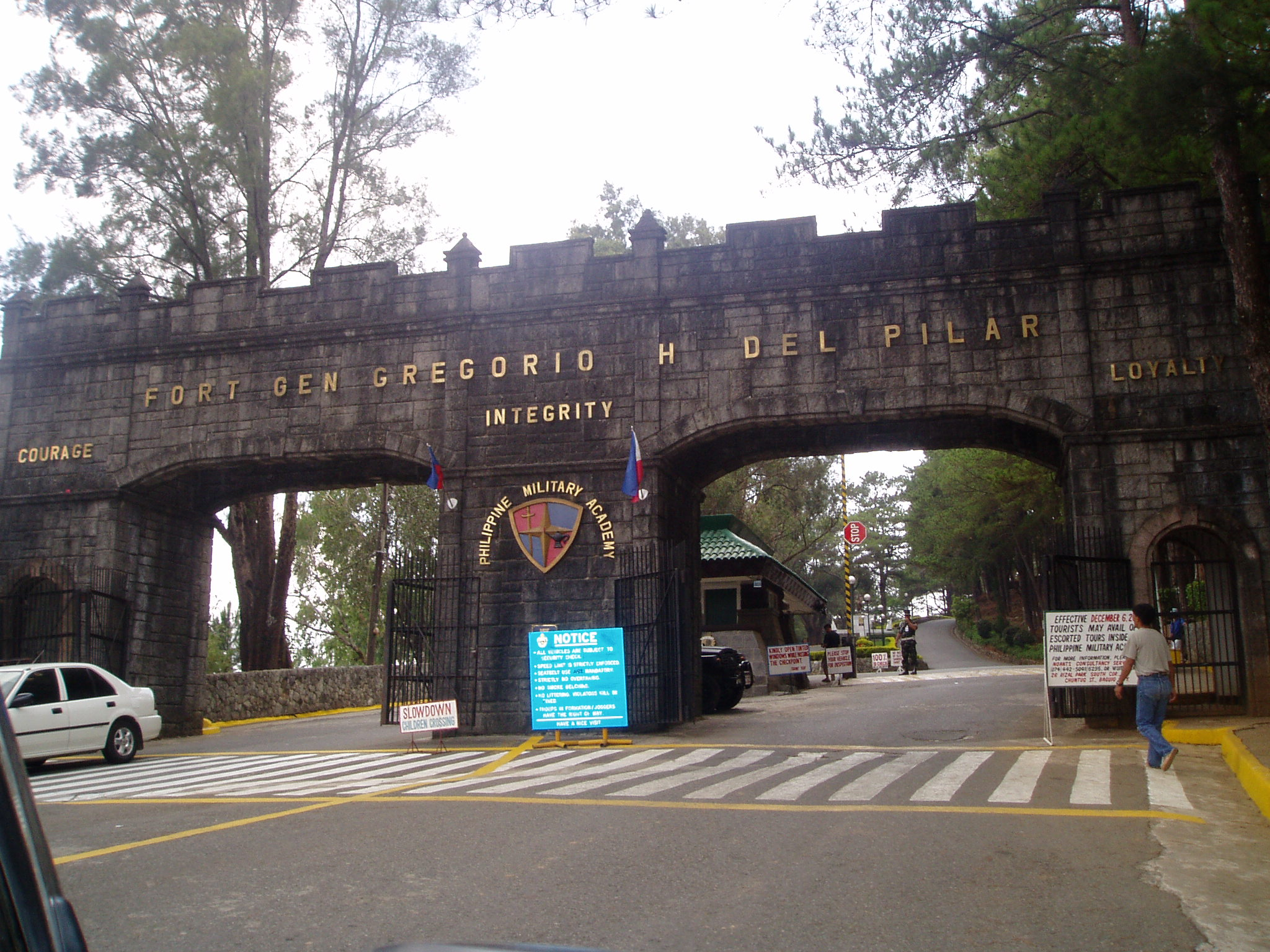 Tagalog: Arko ng Kuta Gregorio del Pilar sa Lungsod ng Baguio